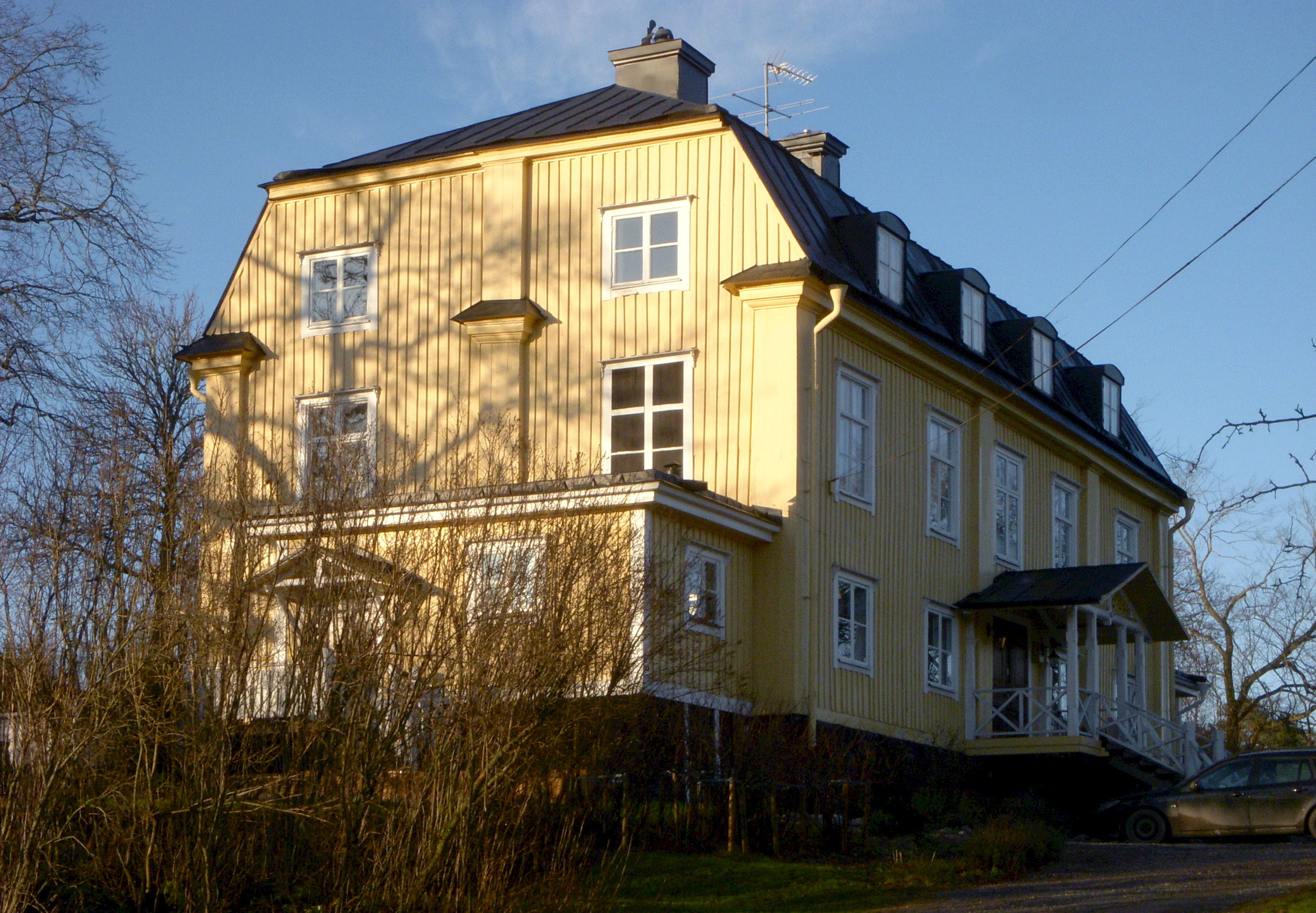 Hässlingeby gård